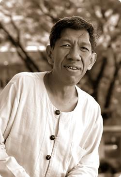 ศ.เกียรติคุณ ดร.ธเนศวร์ เจริญเมือง